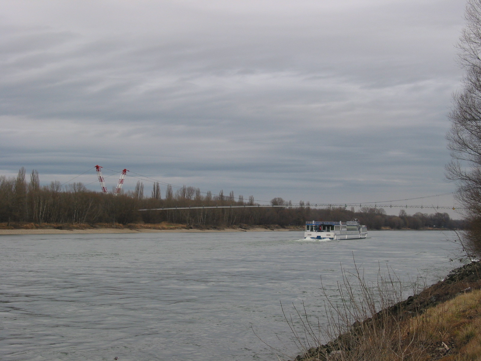 Barbarabrücke in Wien/Mannswörth